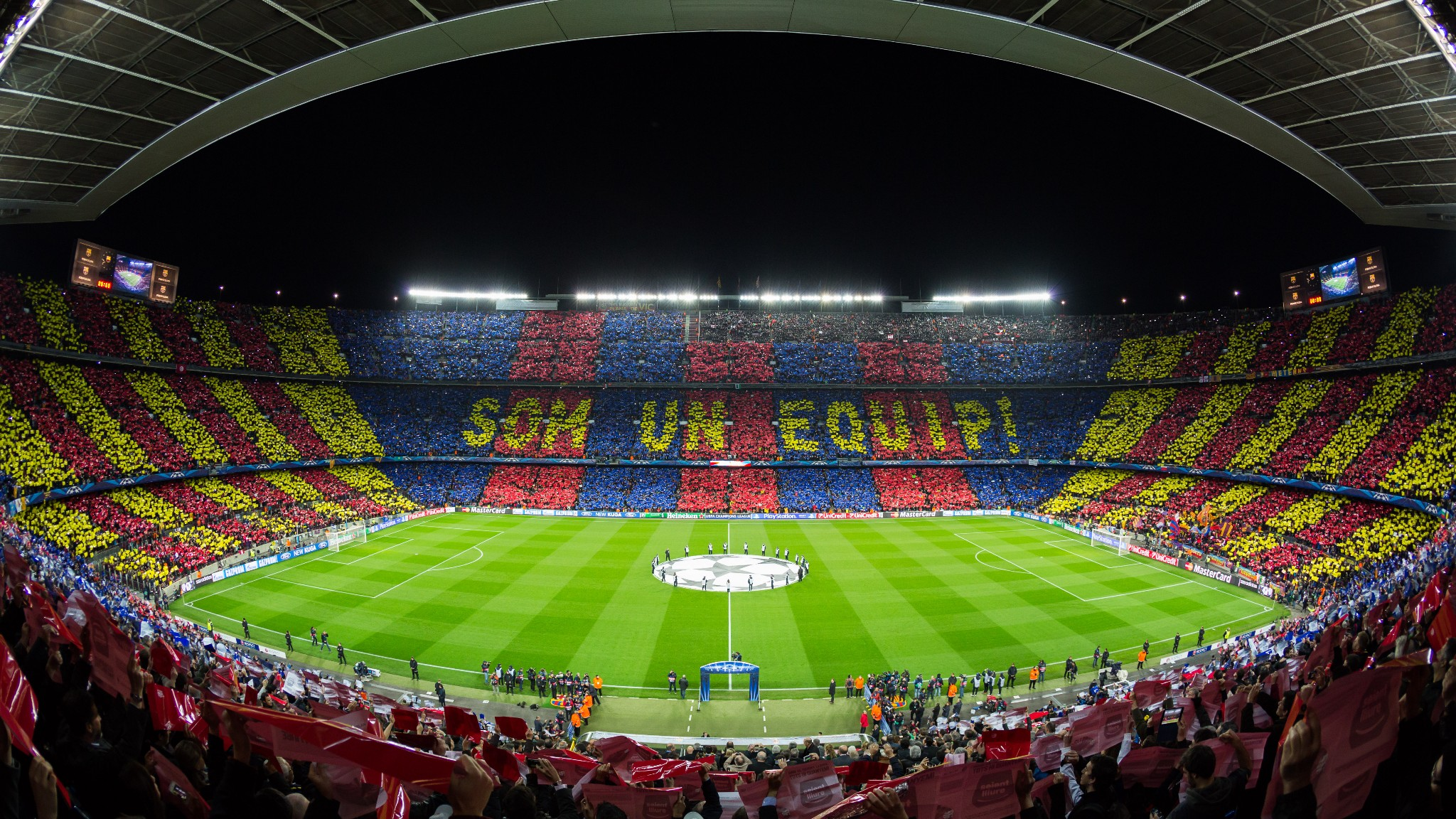 Camp Nou